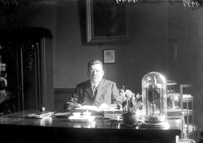 Zum 25. Todestag des ersten deutschen Reichspräsidenten Friedrich Ebert am 26. Februar 1925 Letzte Aufnahme des Reichspräsidenten Ebert , photographiert am 15. Februar, vor 14 Tagen an seinem Schreibtisch.